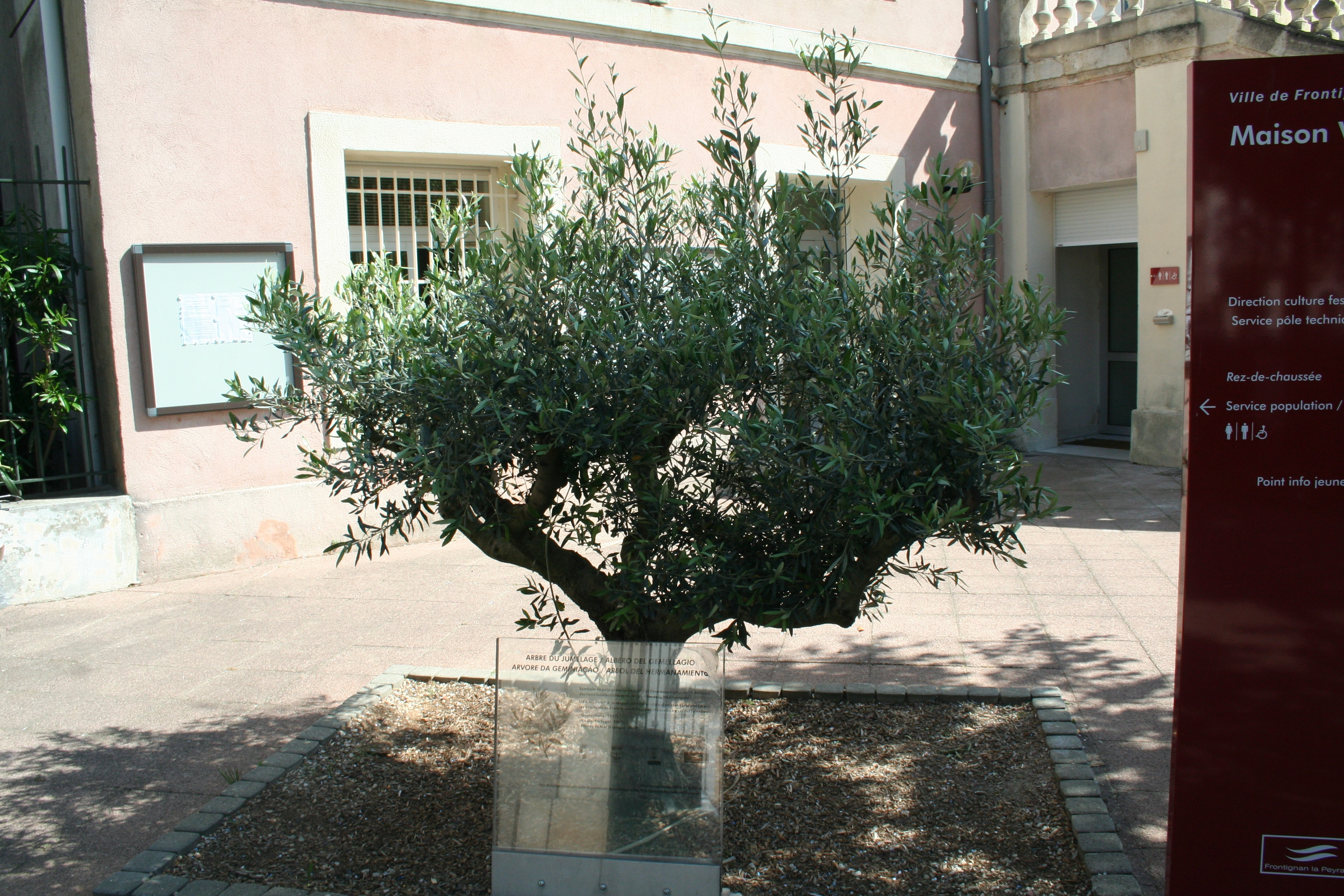 Frontignan (Hérault) - arbre du jumelage planté en 2010 - jumelage avec Gaète (Italie), Pineda de Mar (Espagne), Vizela (Portugal).